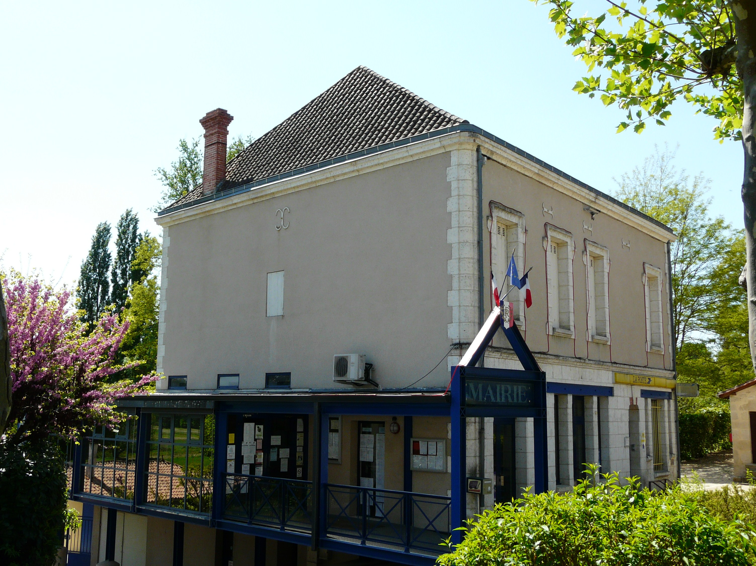 Le bâtiment de la mairie, Le Pizou, Dordogne, France.